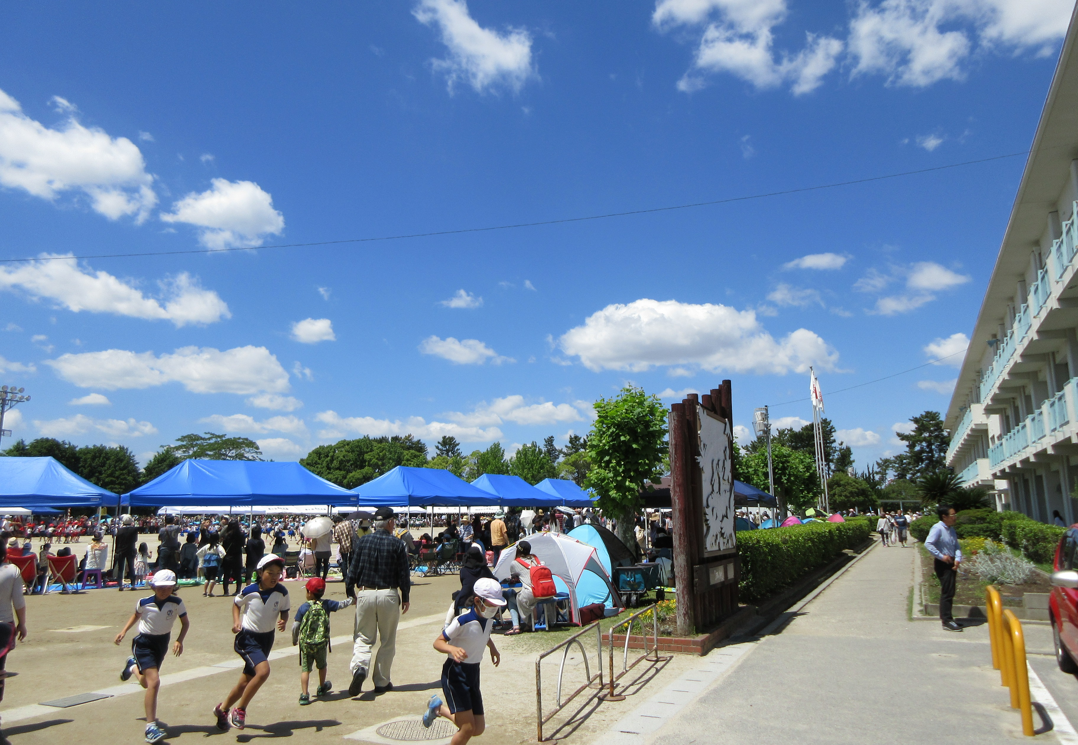 岡崎市立竜美丘小学校（岡崎市竜美台）